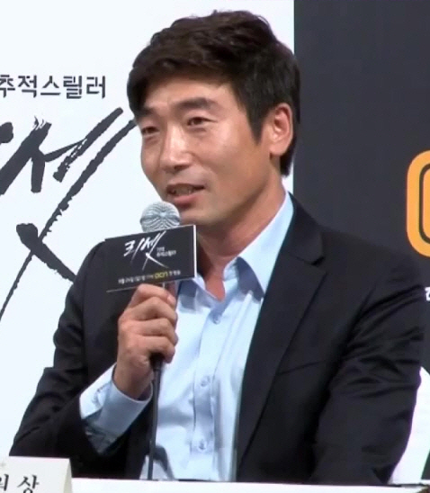 리셋 김소현, 또래보다 두각 아직 부족한 점 많다 (MD동영상)